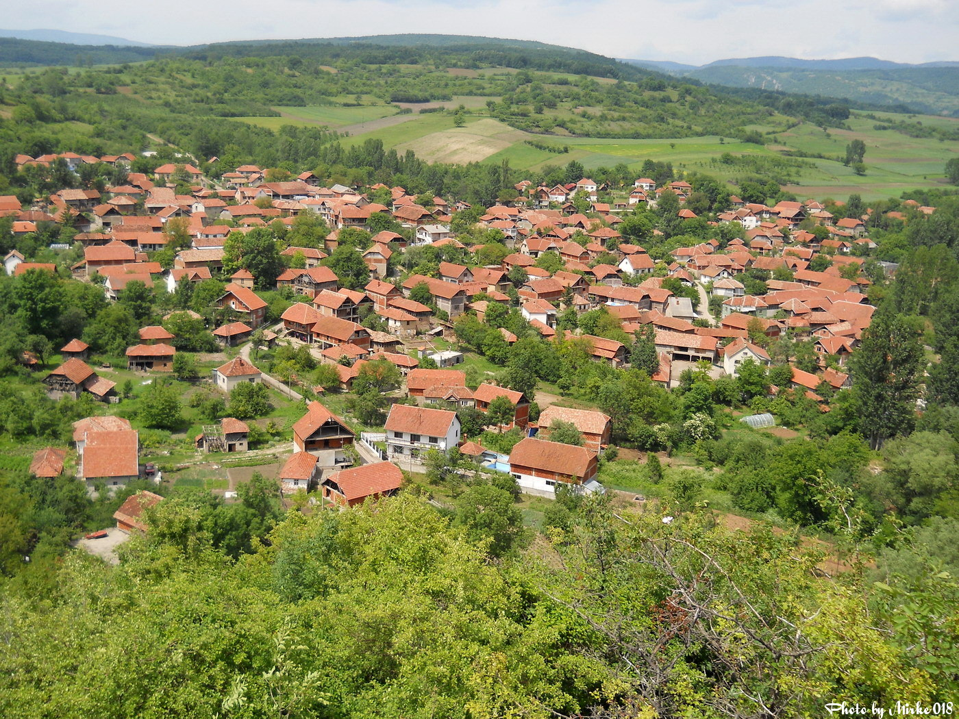 Кравље